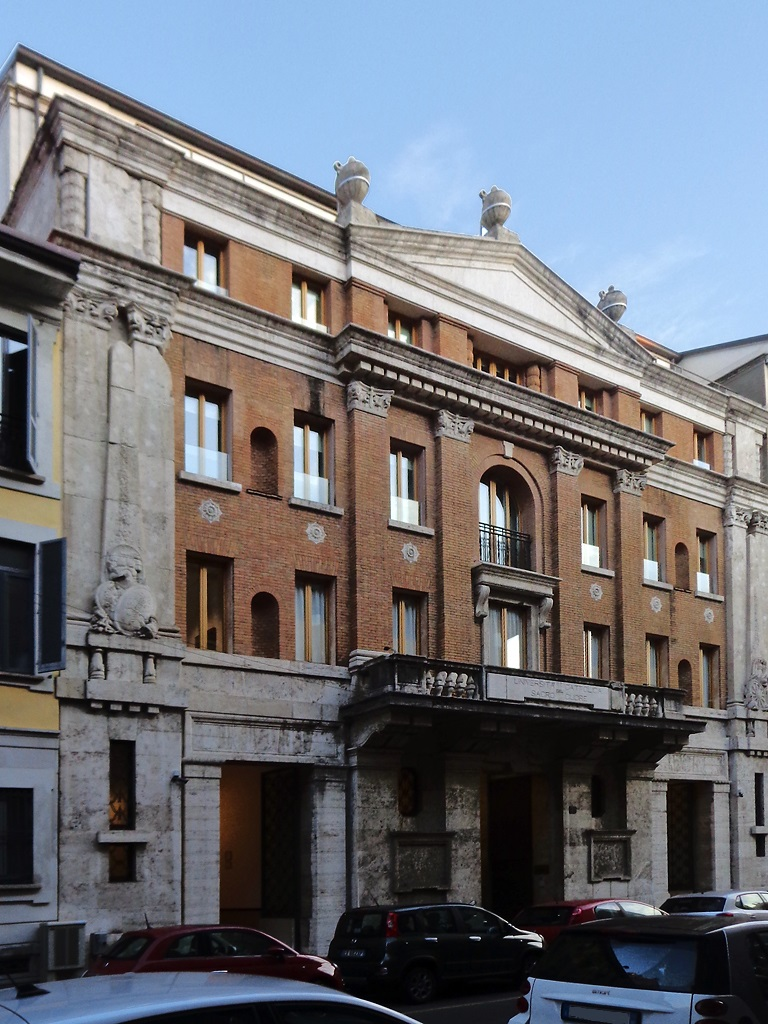 Milano, la Casa dei Fasci milanesi in via Nirone 15, costruita nel 1927 su progetto di Paolo e Vittorio Mezzanotte (Fonte: Maurizio Grandi e Attilio Pracchi, Milano. Guida all'architettura moderna, Bologna, Zanichelli [1980], 1998, p. 157. ISBN 88-08-05210-9.)In seguito divenne la sede cittadina della Democrazia Cristiana, e attualmente è di proprietà dell'Università Cattolica.